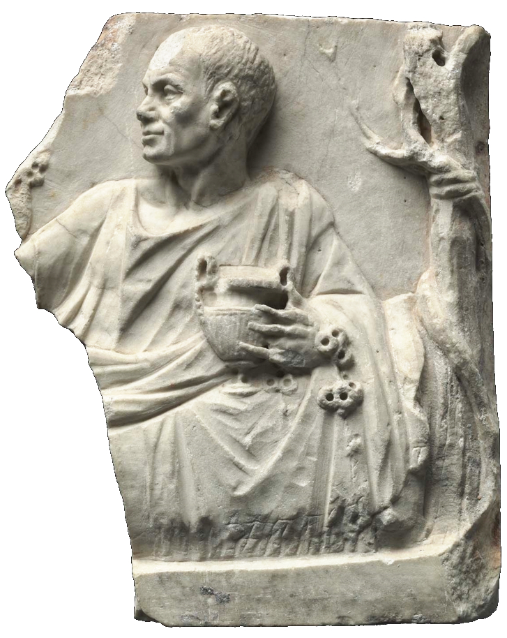 Domniemany portret Horacego. Relief rzymski z około 50 roku. Boston, Museum of Fine Arts.